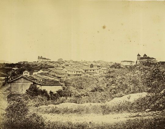 Cidade de S. Luzia. Com construções primitivas